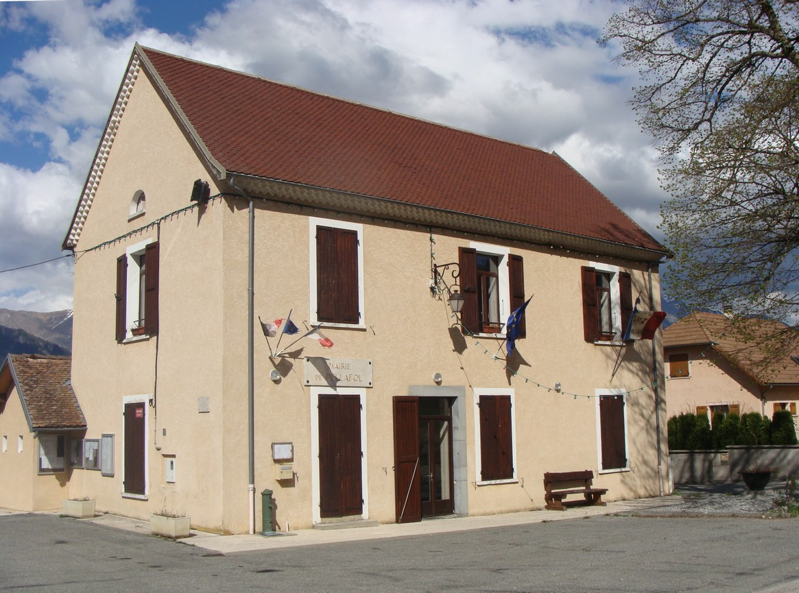 La mairie de Pellafol (Isère), aux Payas.